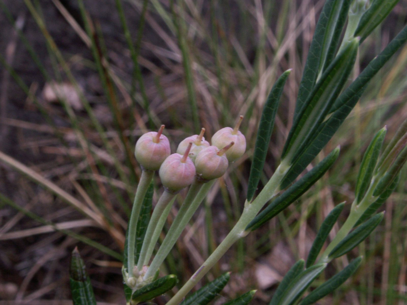 Andromeda polifolia fruits